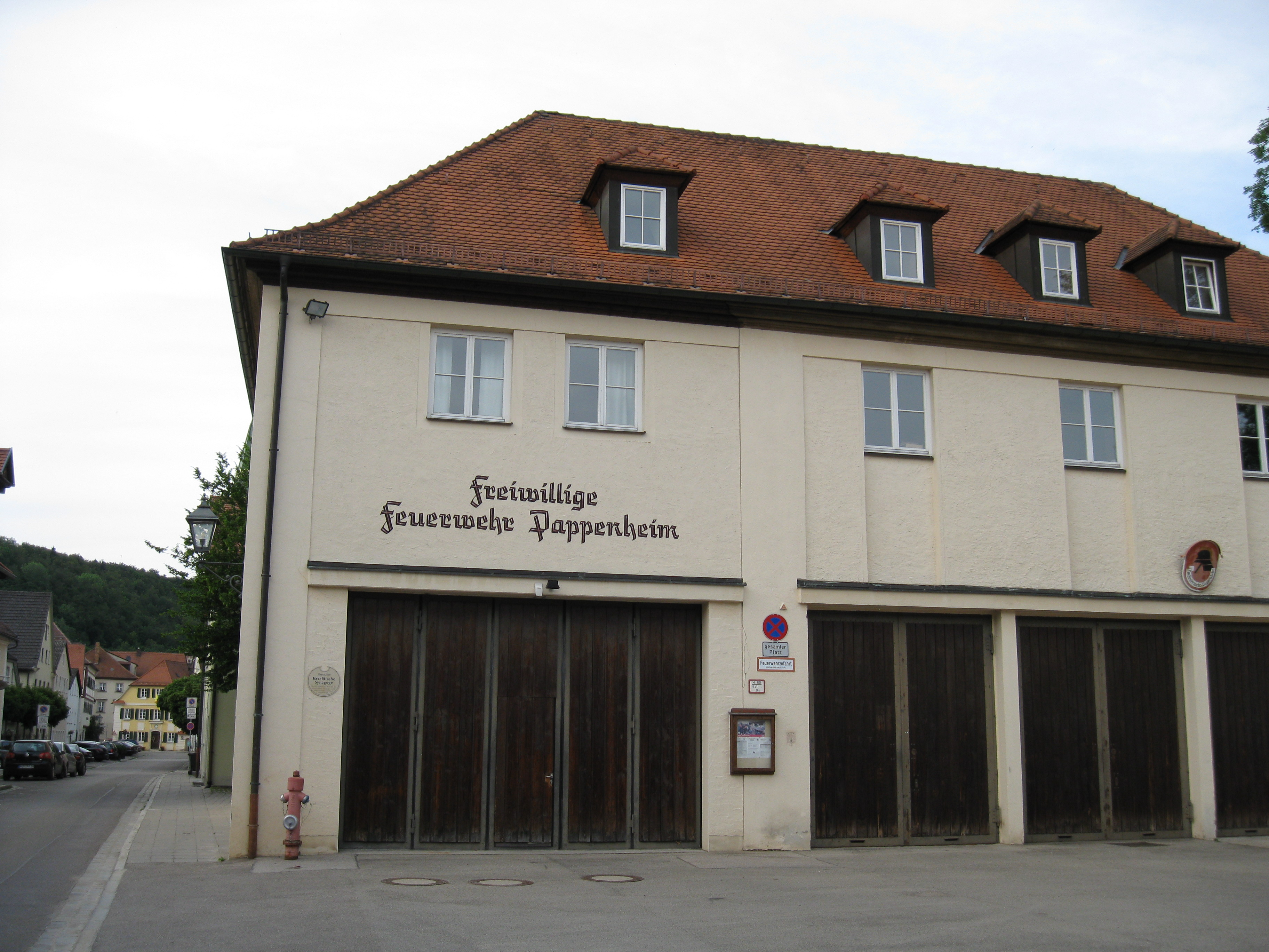 Pappenheim